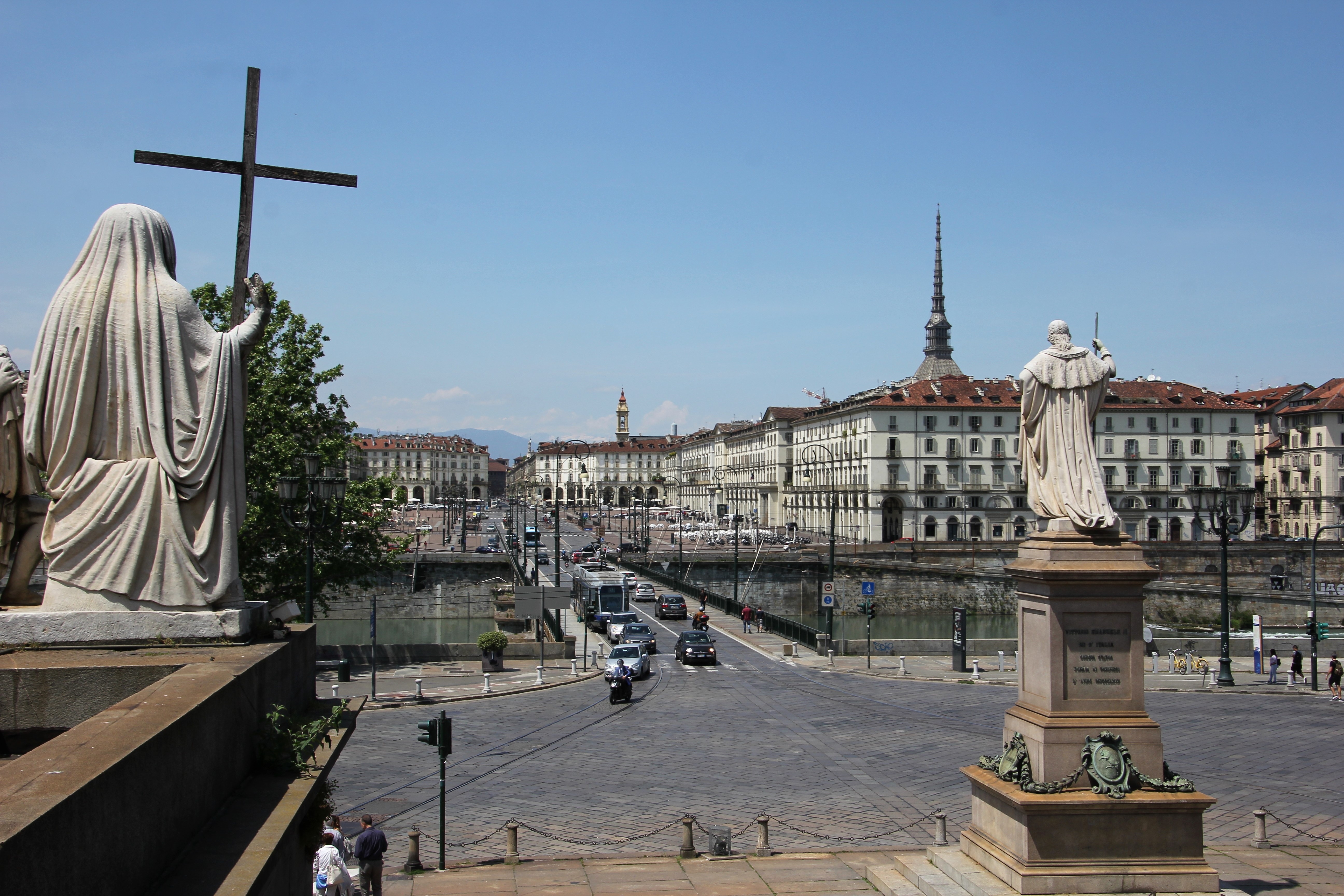 Torino, piazza Vittorio Veneto